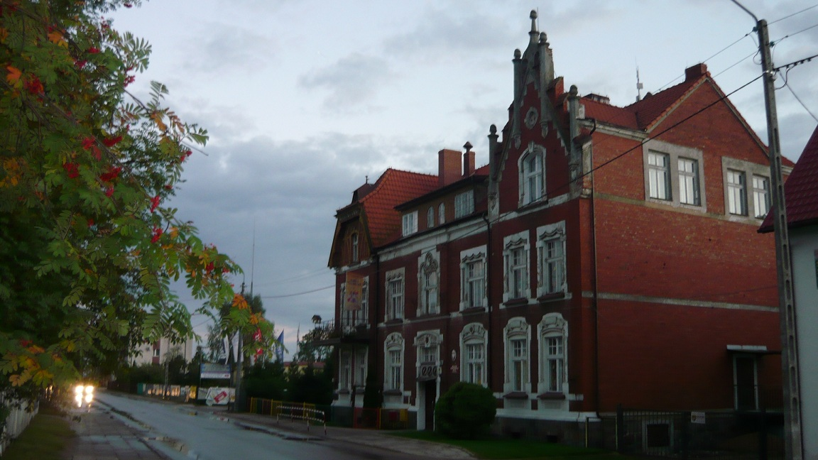 kamienica mieszcząca obecnie Przedszkole Miejskie nr 9 Szczytno, ul. Polna 16, Szczytno (gmina miejska)